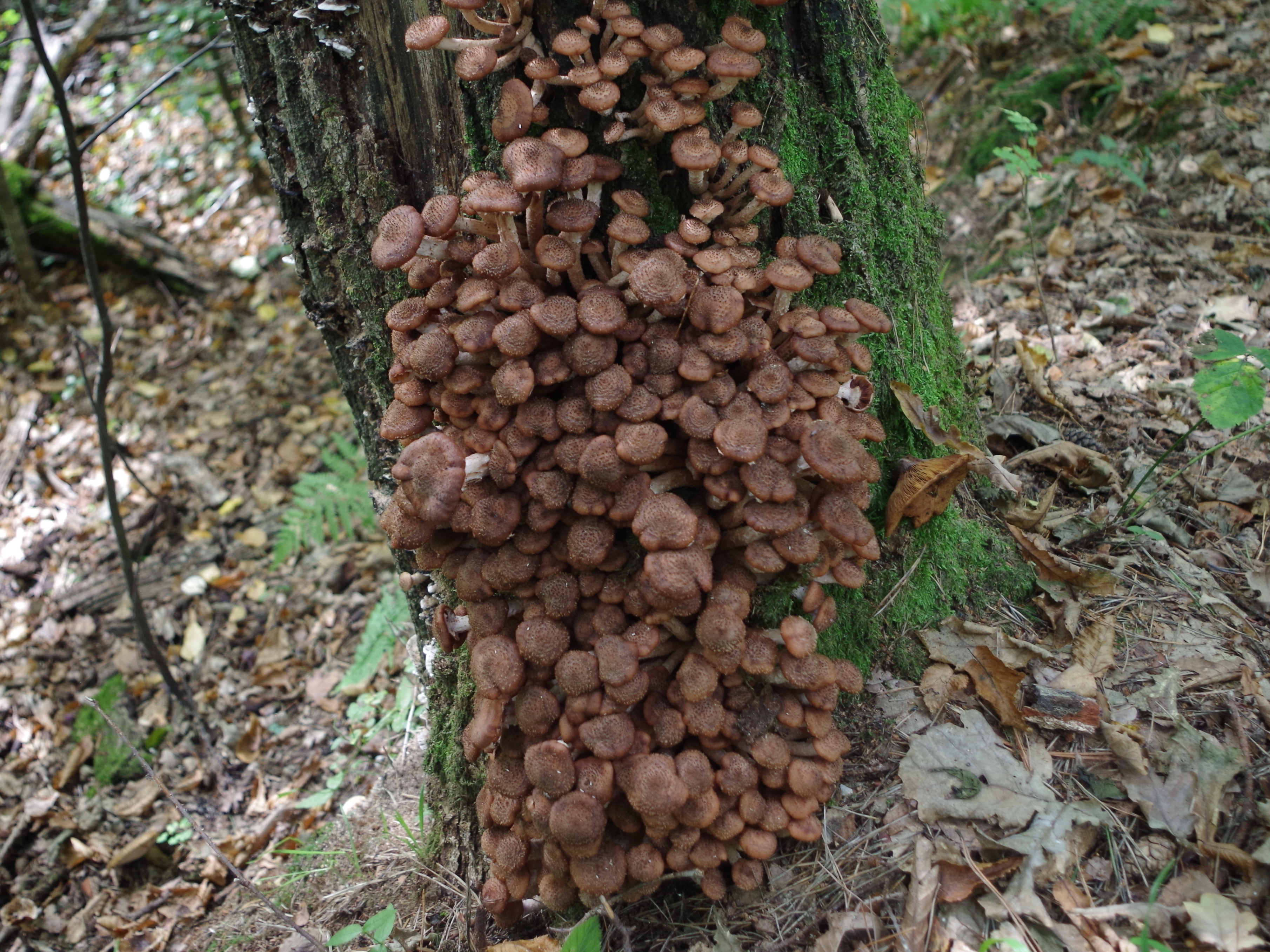 Trametes versicolor (location:Poland, Kamionna, województwo małopolskie)